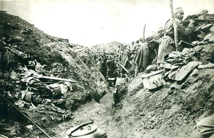 Снимка от позициите на босненско-херцеговински пехотен полк от австро-унгарската армия в Източна Галиция, Украйна през Първата световна война.